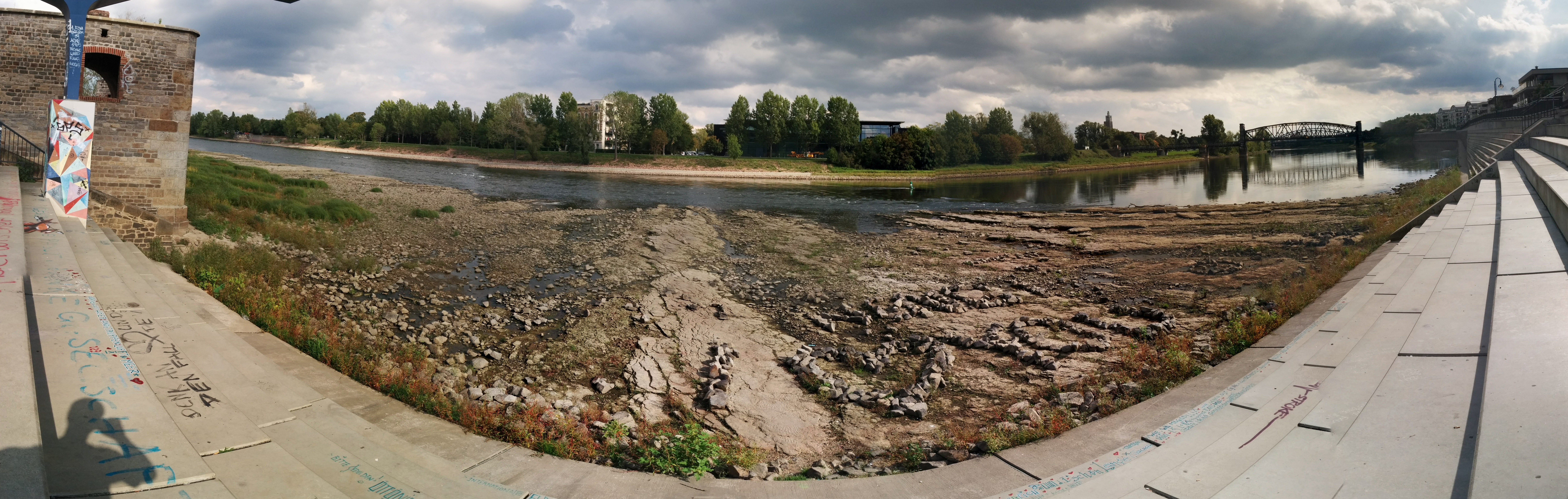 Panorama des Domfelsens Magdeburg bei Niedrigwasser von der Treppe aus gesehen